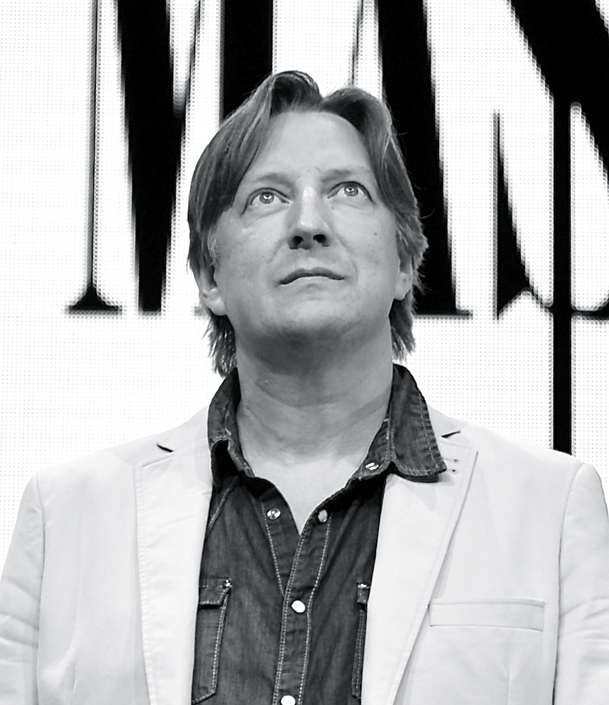 Per Svensson under Öppet hus på Dramaten den 6 september 2014.